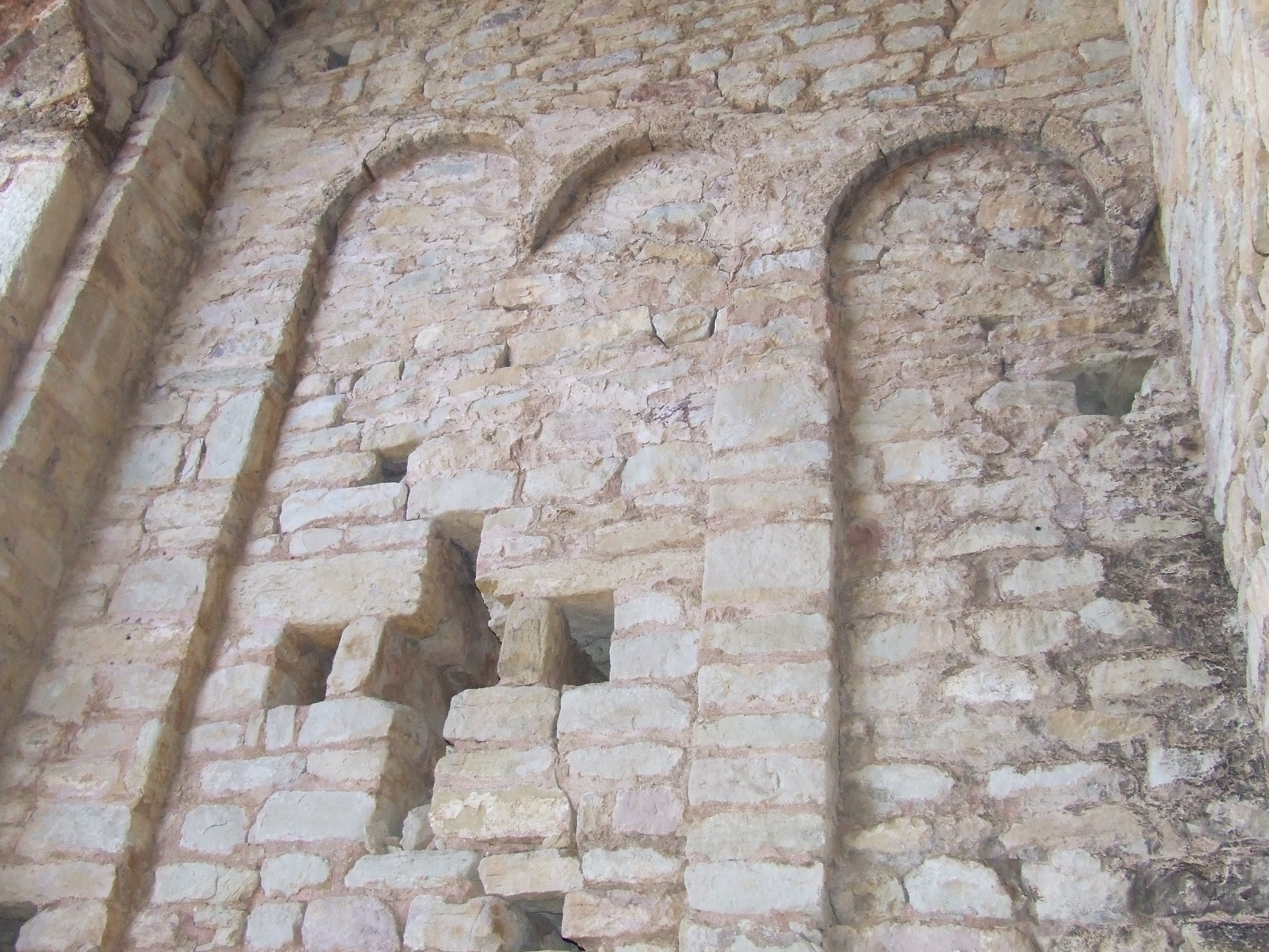 Arcuacions llombardes de Sant Sadurní del Castell de Llordà (Llordà, Isona i Conca Dellà, Pallars Jussà)